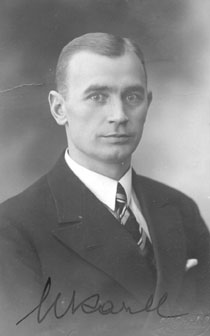 Ulrich Karell